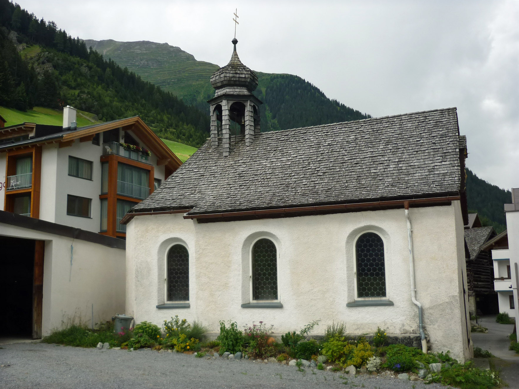 Kapelle im Ortsteil Paznaun von Ischgl